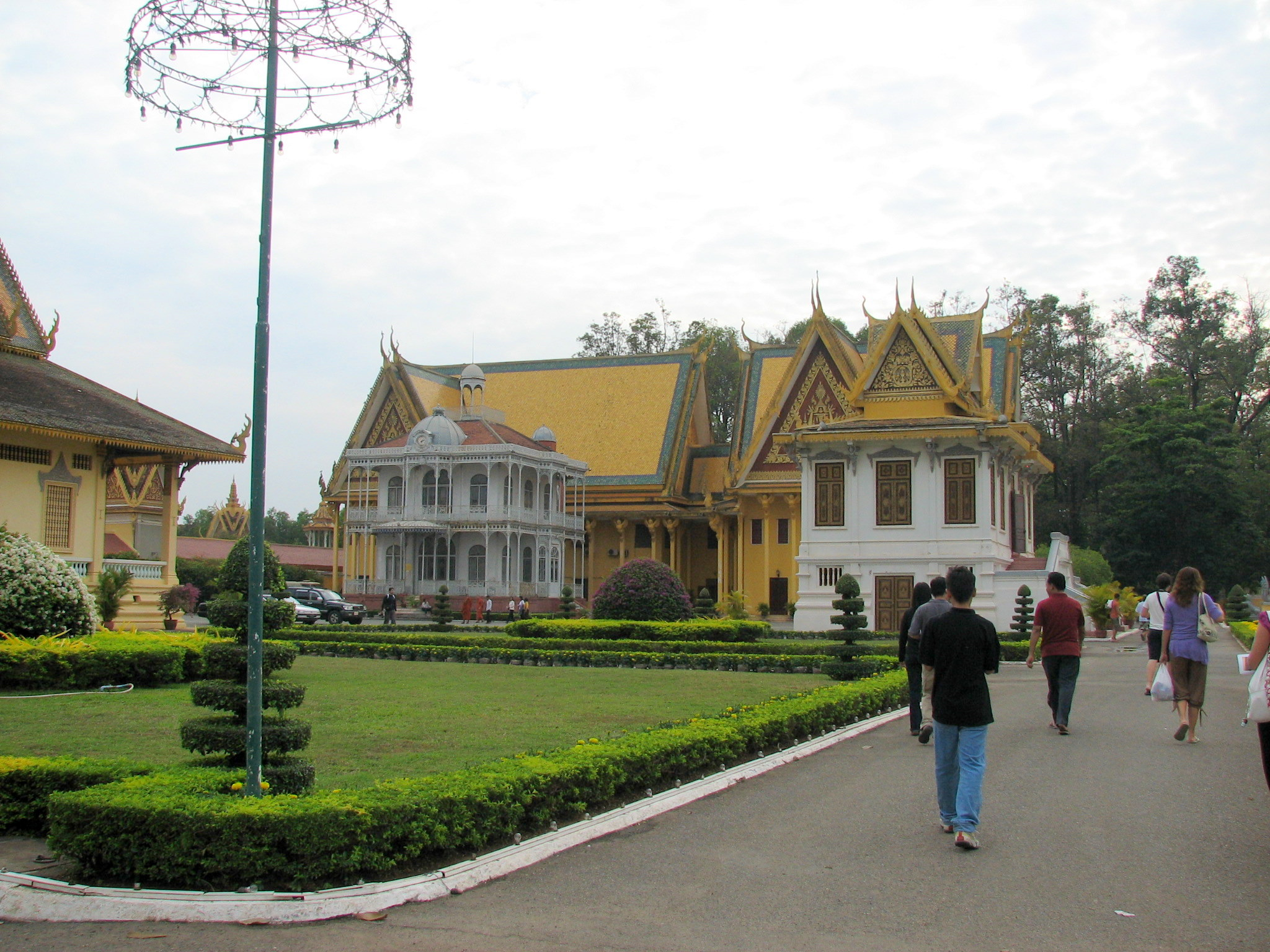 Royal Palace including gardens and tombs in pagoda, Phnom Penh Cambodia הארמון המלכותי שעיר פנום פן בירת קמבודיה. הארמון נמצא במתחם סגור הכולל מבנים רבים גנים ופגודות שהינם קברים של בני המשפחה המלכותית